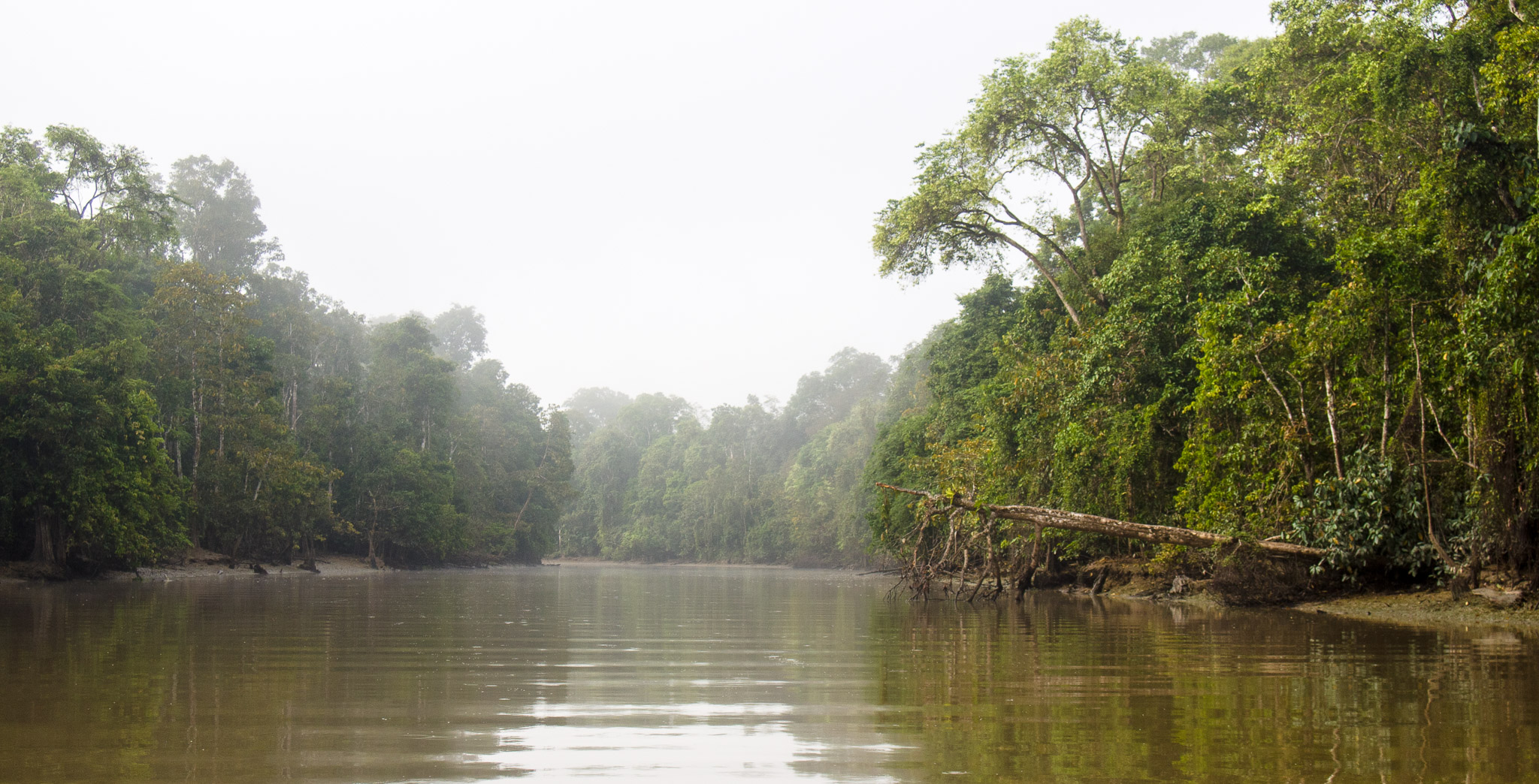 Kinabatangan River